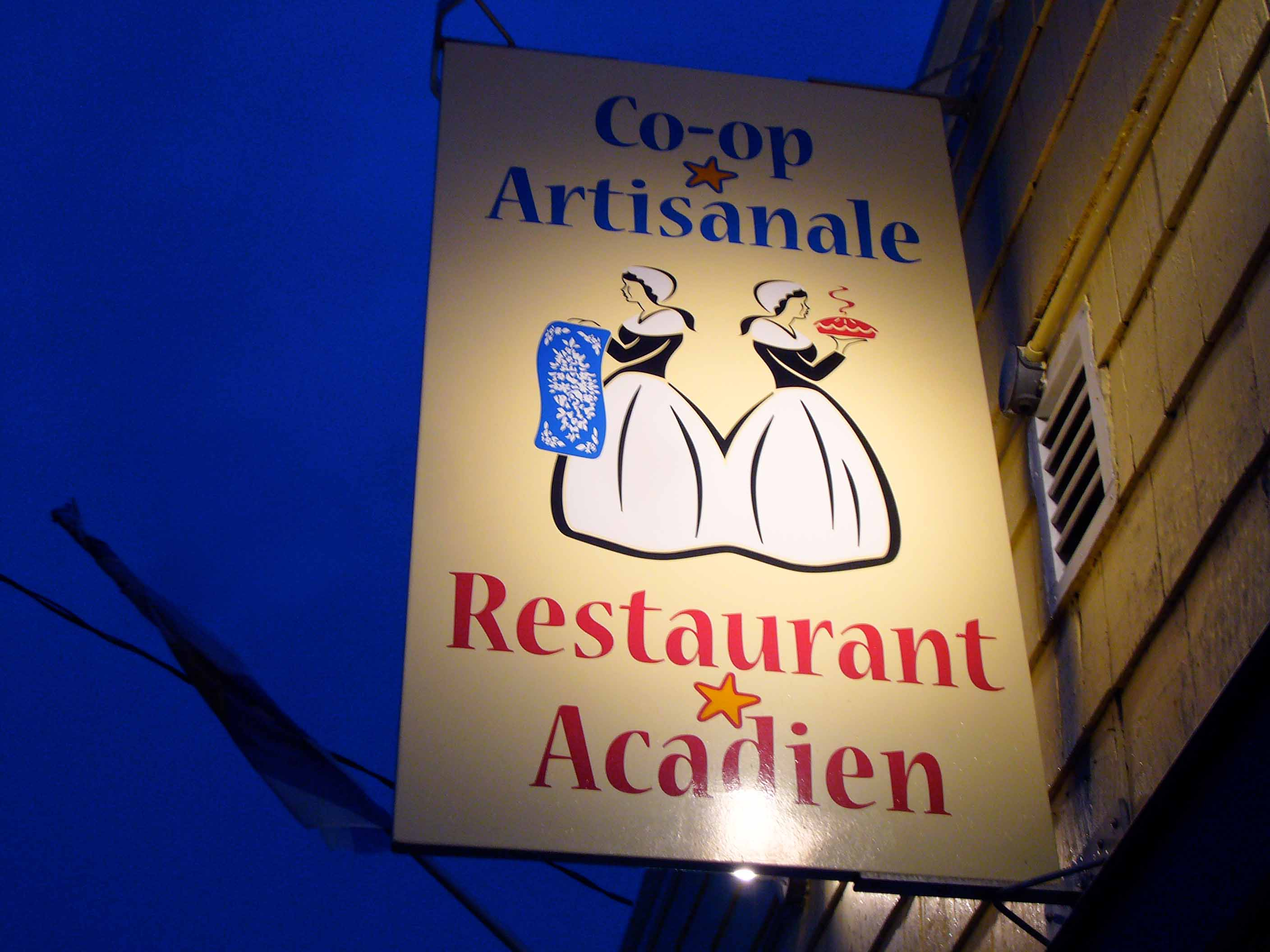 restaurant acadien in cheticamp